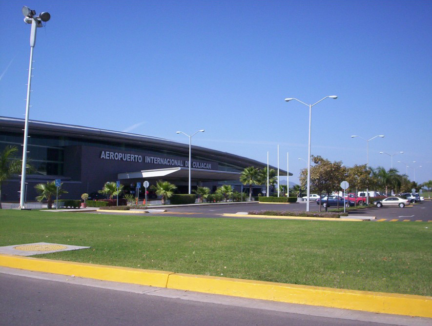 Aeropuerto Internacional de Culiacan Culiacán, Sinaloa, México Author: MightyKC